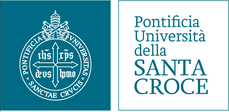 logo ufficiale della Pontificia Università della Santa Croce